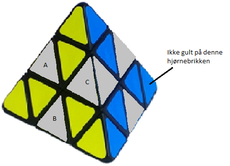 Kuben etter at steg 1 og 2 er fullført. Hjørnebrikkene er vridd riktig. Og senterbrikkene er på rett side. Kantbrikkene er klare til å bli plassert i steg 3.